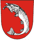 znak města